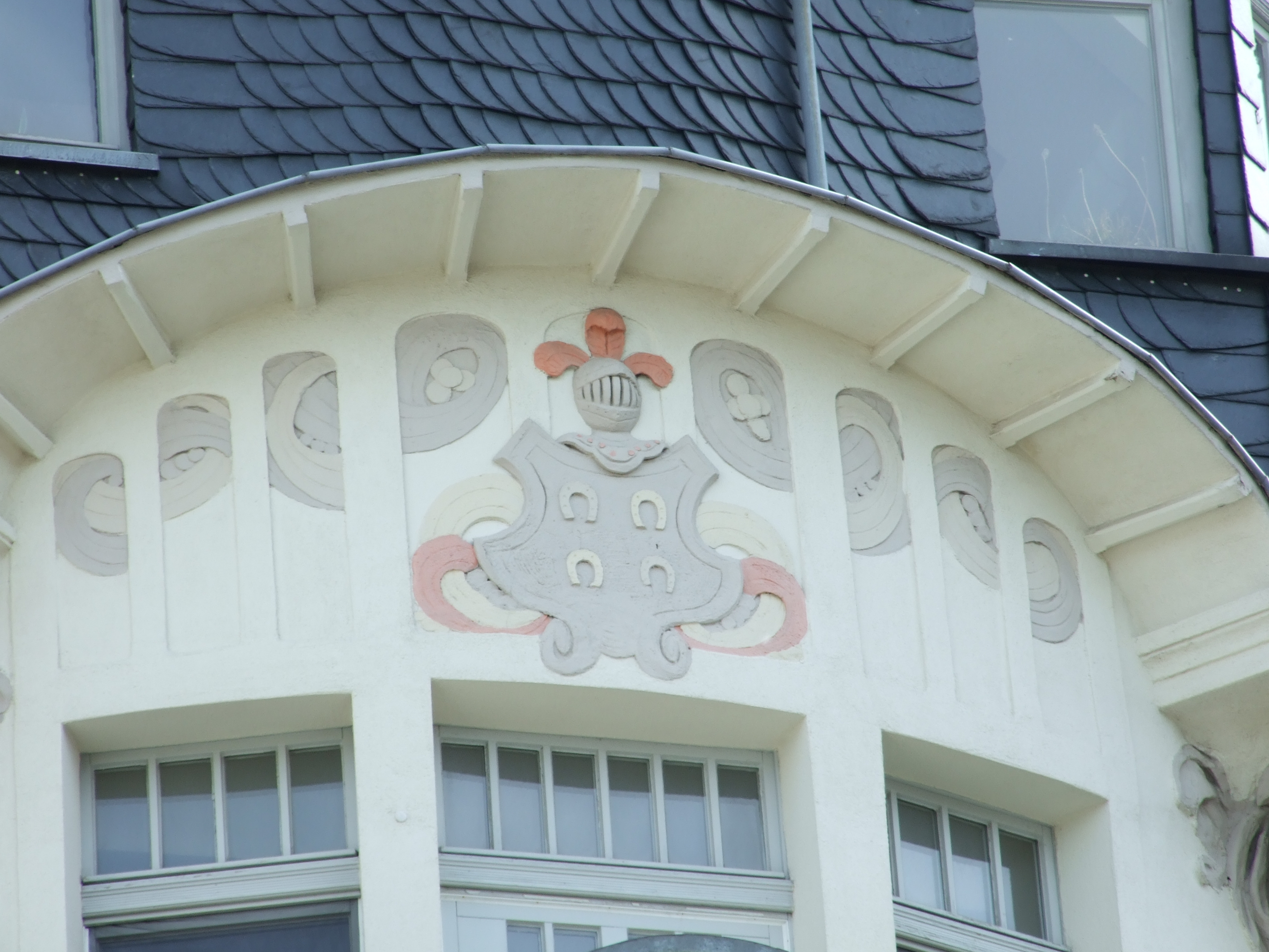 Herne, Viktor-Reuter-Straße 18, Detail Turm